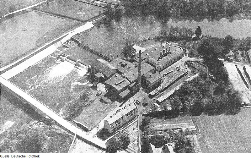 Original image description from the Deutsche FotothekRothenburg/O.L.-Lodenau. Holzstoff- und Lederpappenfabrik, aus: Monographien deutscher Landschaften - Die preußische Oberlausitz, 1927